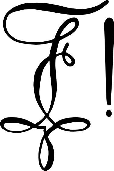 Zirkel des "Bundes deutscher Studenten Saxonia Prag zu Nürnberg"